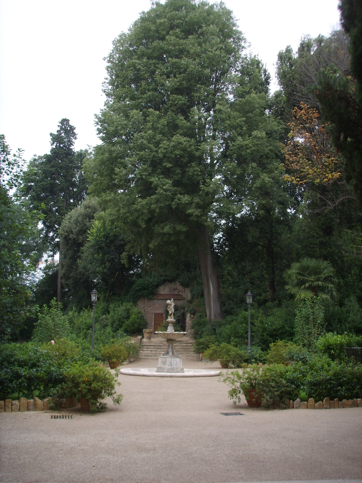 Palazzo della gherardesca, giardino